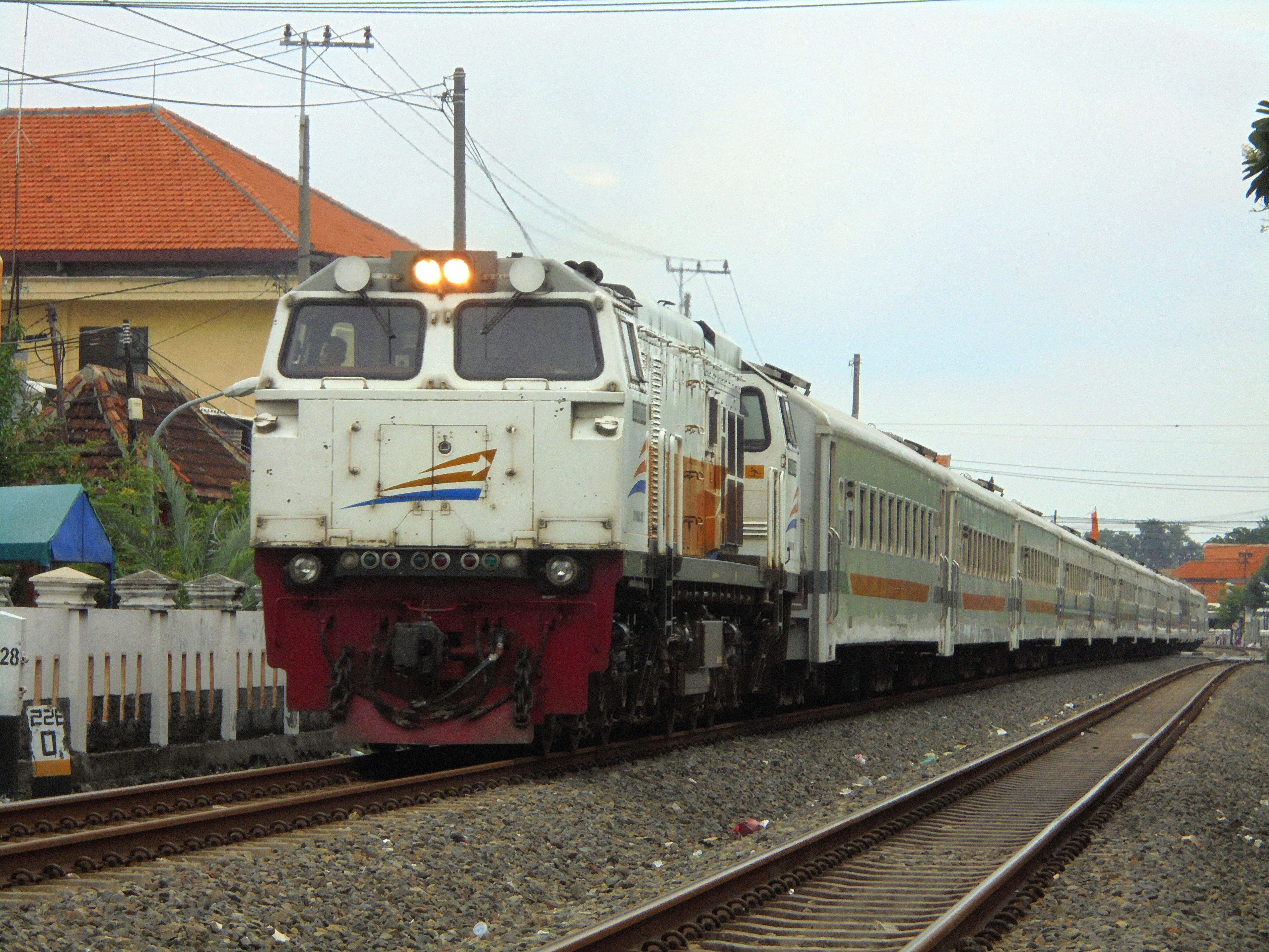 Kereta api Gumarang saat melintas di Tembok Dukuh, Bubutan, Surabaya